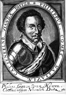 Filips van Nassau